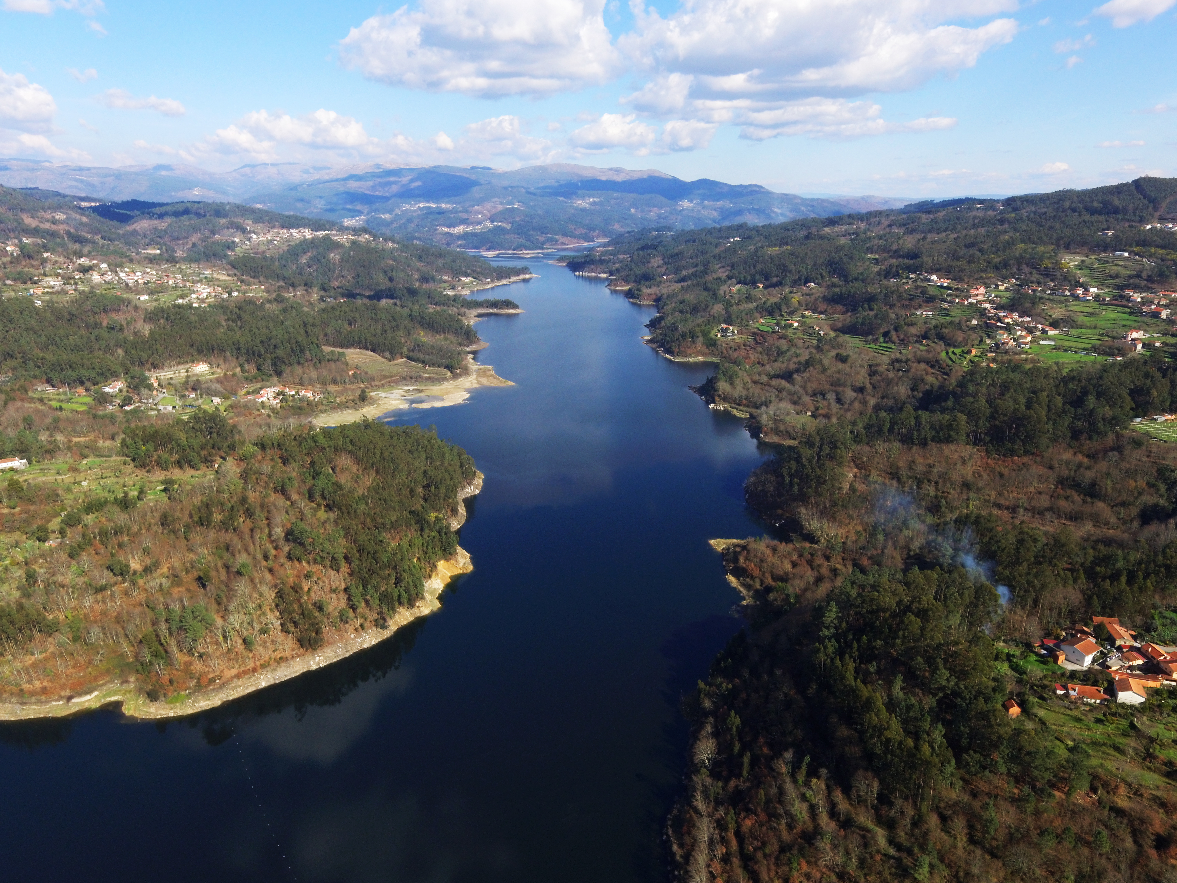 Rio Vouga